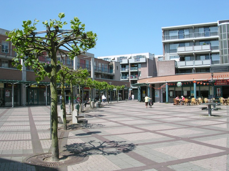 Het winkelcentrum (Aagje Dekenplein) van de wijk Kersenboogerd in de stad Hoorn. Shoppingmall Kersenboogerd in the district Kersenboogerd in the city Hoorn.